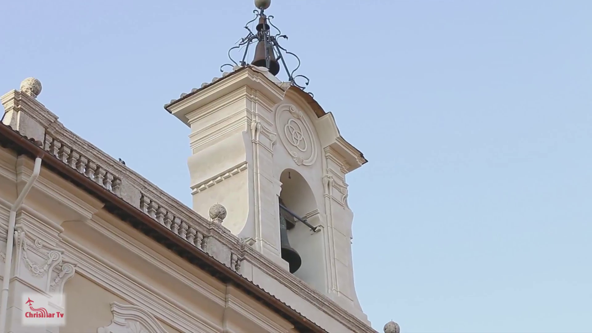 Il piccolo campanile sulla facciata del Palazzo Comunale di Rieti (Lazio)